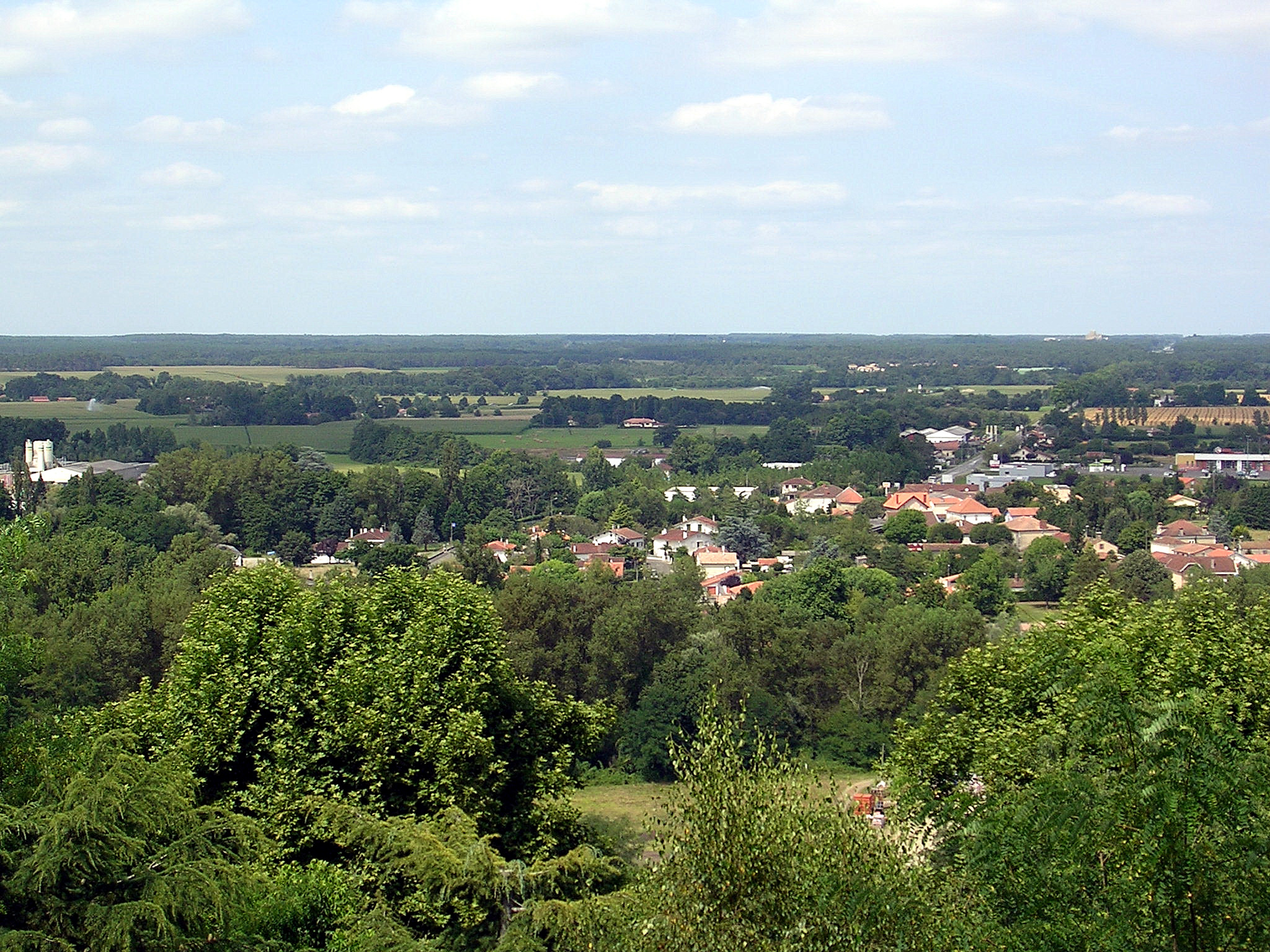 Vue panoramique sur les Petites Landes de la place de Morlanne à Saint-Sever, sur les premières hauteurs de la Chalosse (Landes, France)